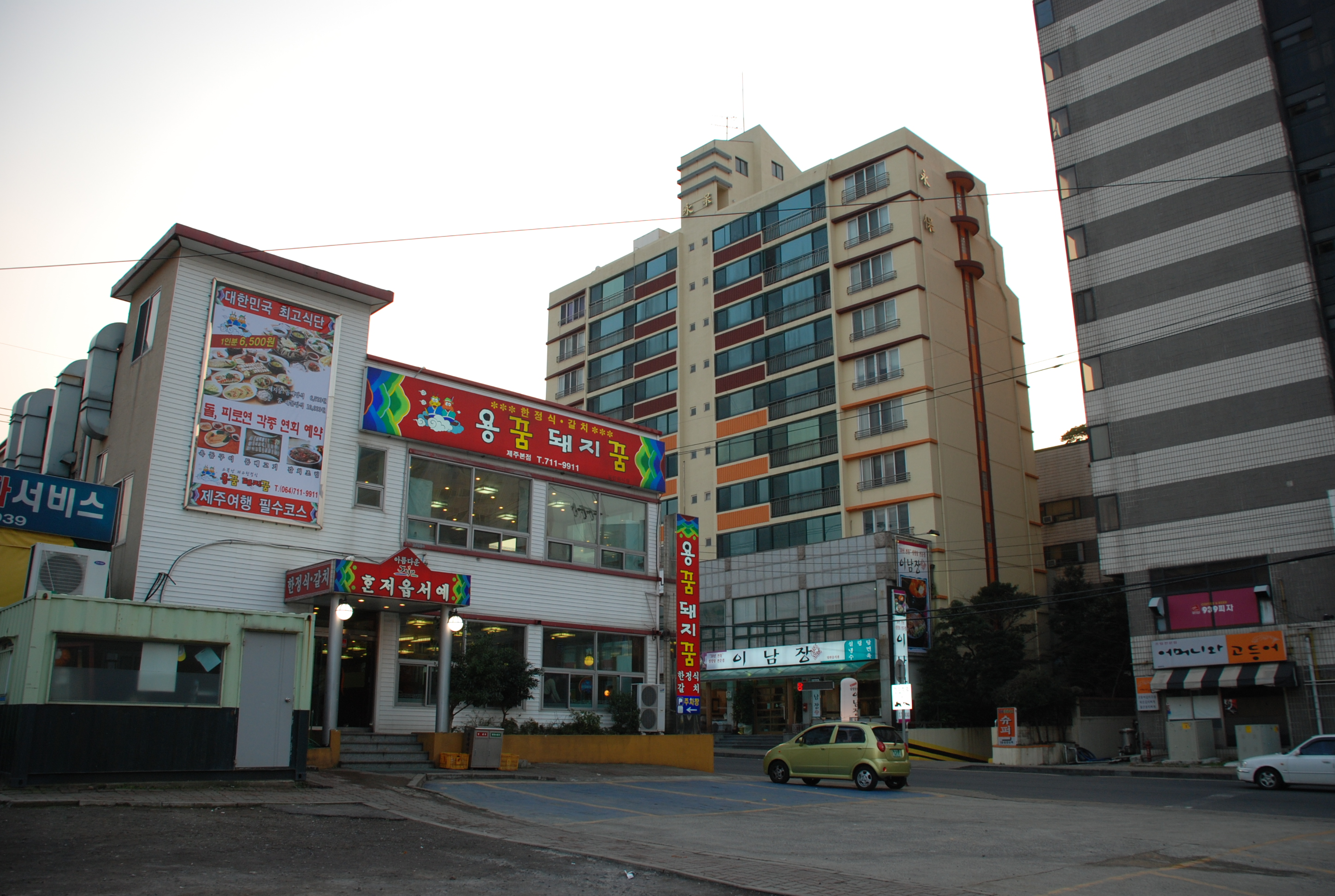 Ayeon-ro, Jeju-si, Jeju-do, South Korea